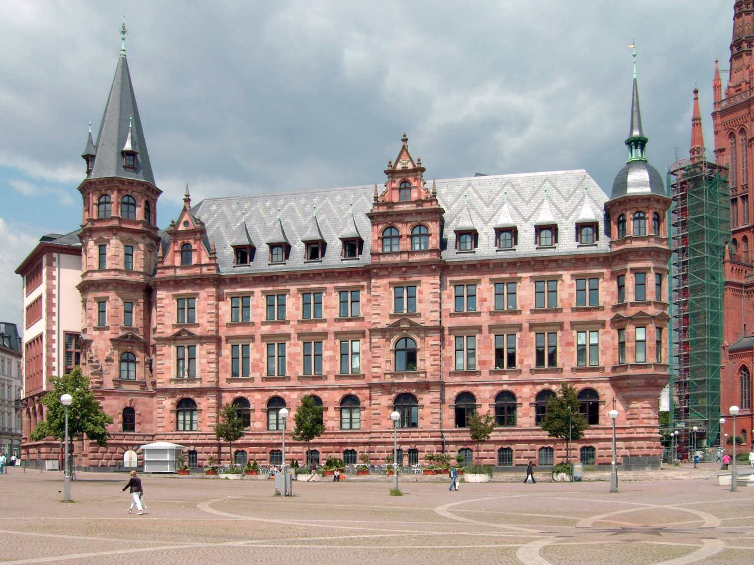 Neues Rathaus der Stadt Wiesbaden von Georg von Hauberrisser, gesehen vom Südende des Dernschen Geländes